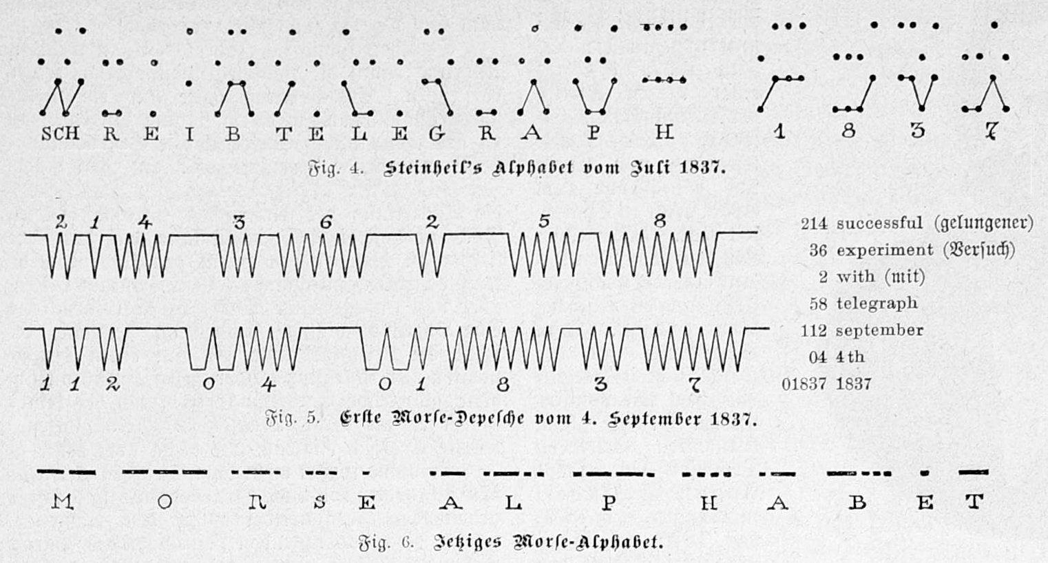 Bild aus Seite 606 in "Die Gartenlaube". Image from page 606 of journal Die Gartenlaube, 1887.